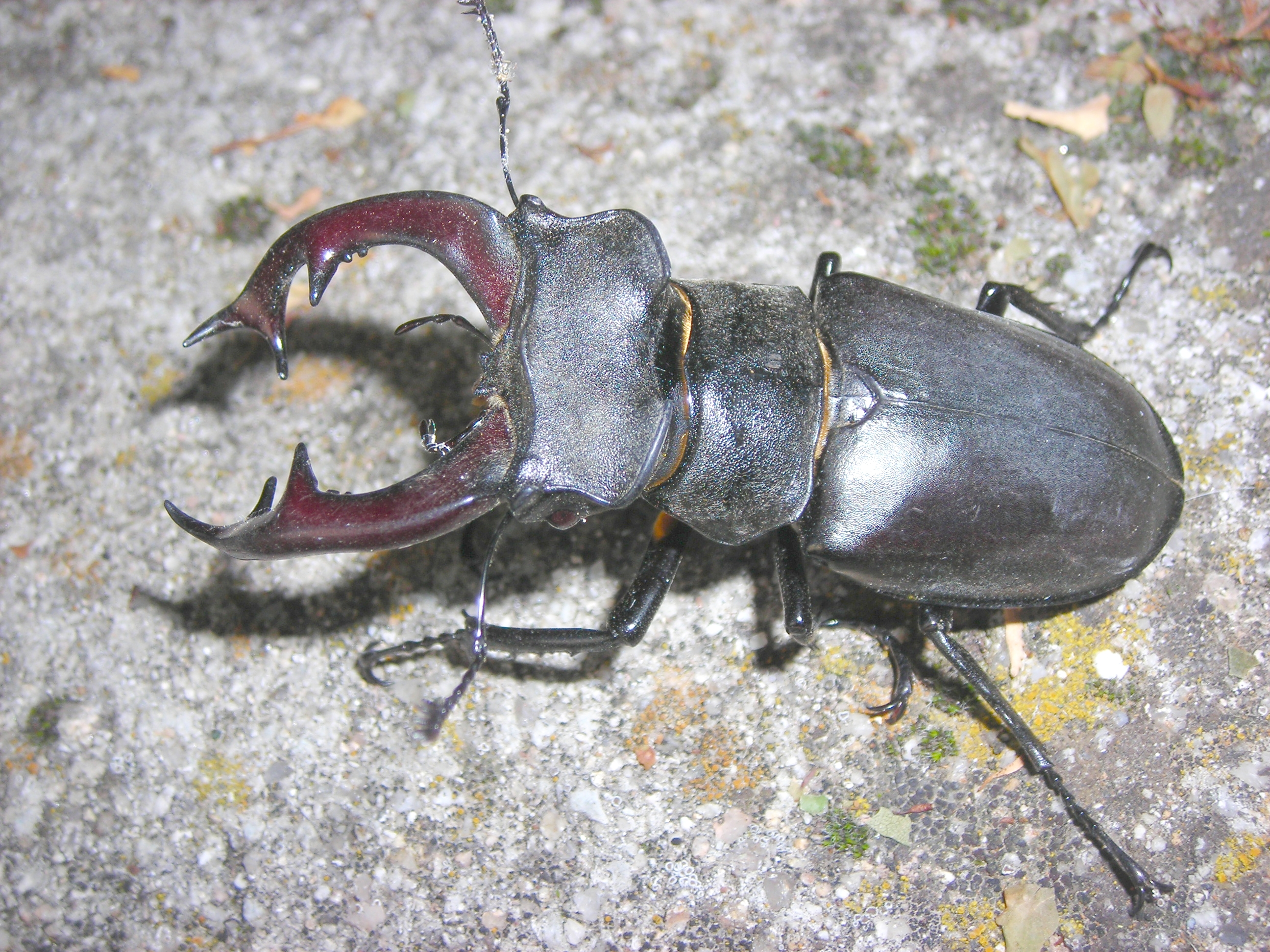 Ciervo volante. En Navasfrías (Salamanca), España, se conoce como garrocha en la variedad de habla leonesa propia del lugar.